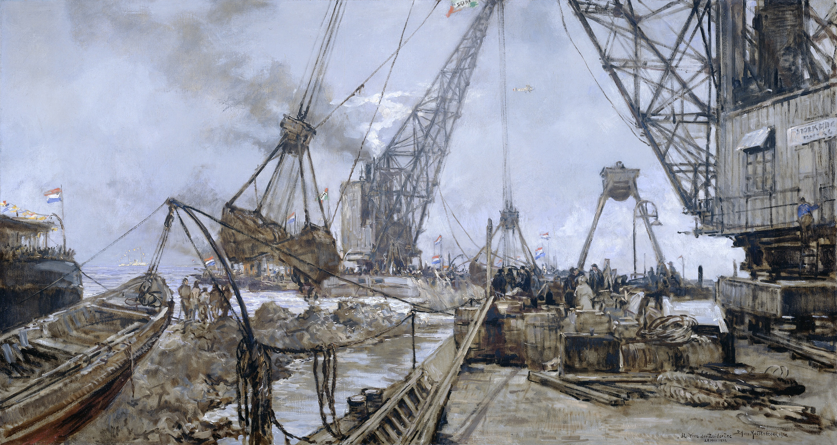 Sluiting van de Zuiderzee. oil on canvasmedium QS:P186,Q296955;P186,Q12321255,P518,Q861259. Height: 71.5 cm (28.1 ″); Width: 131.5 cm (51.7 ″) dimensions QS:P2048,71.5U174728;P2049,131.5U174728. Amsterdam, Rijksmuseum Amsterdam (SK-C-1682) of/in bruikleen van Enkhuizen, Zuiderzeemuseum (1413)